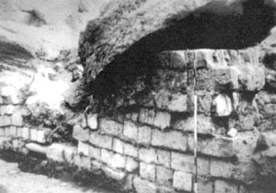 Zerfallene Fundamente des großen Säulensaals in Karnak mit einer umgestürzten Säule